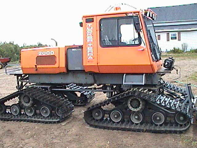 Modern all rubber Terra